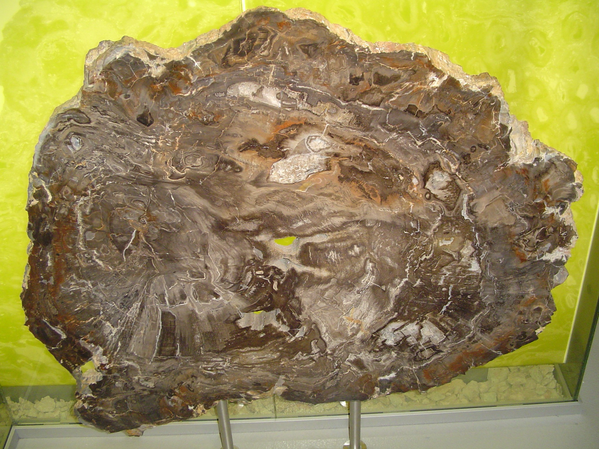 aufgenommen im Tietz Chemnitz